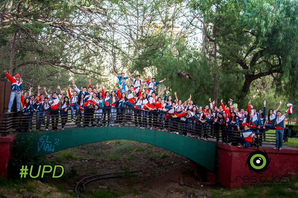 Ultimo primer día Tablaeros